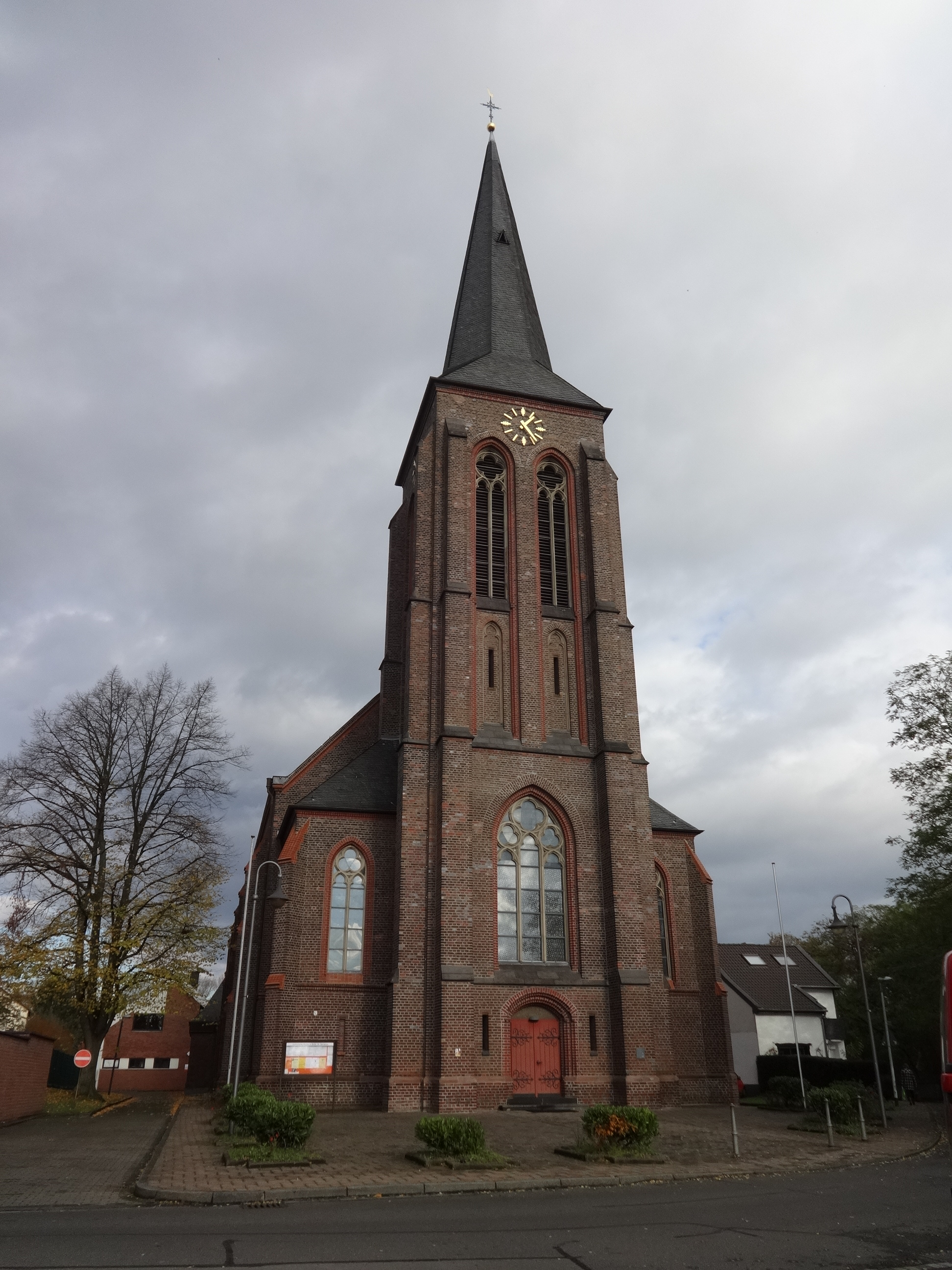 Die neugotische Hallenkirche St. Servatius in Brühl-Kierberg (Rheinland) entstand in den Jahren 1903 bis 1904 nach Plänen des Architekten Alfred Tepe. Sie ersetzte einen Vorgängerbau aus dem 14. Jahrhundert. Neben den neugotischen Fenstern ist insbesondere ein Altar aus dem 17. Jahrhundert sehenswert, der den Aposteln Matthias und Jakobus gewidmet ist. Ein Volksaltar stammt vom Sürther Bildhauer Theo Heiermann.